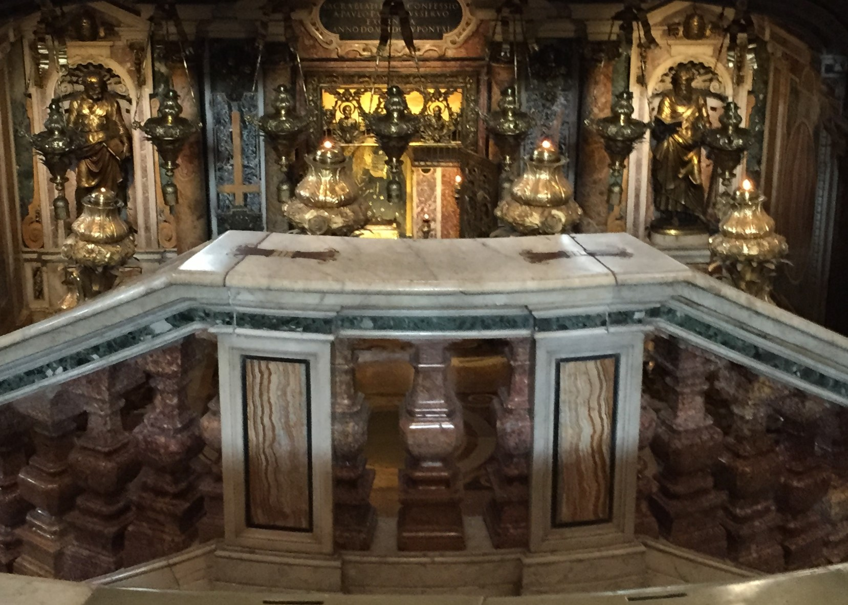 Tumba de San Pedro